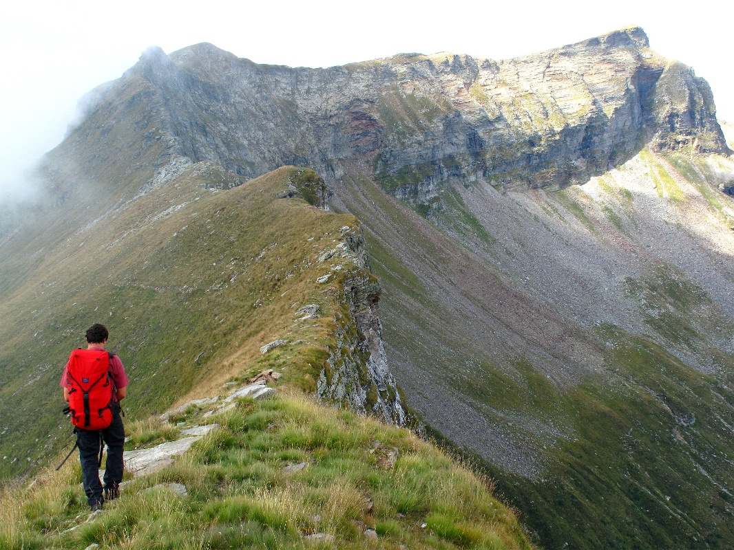 Via Alta Idra und Via Alta Verzasca TI, Schweiz